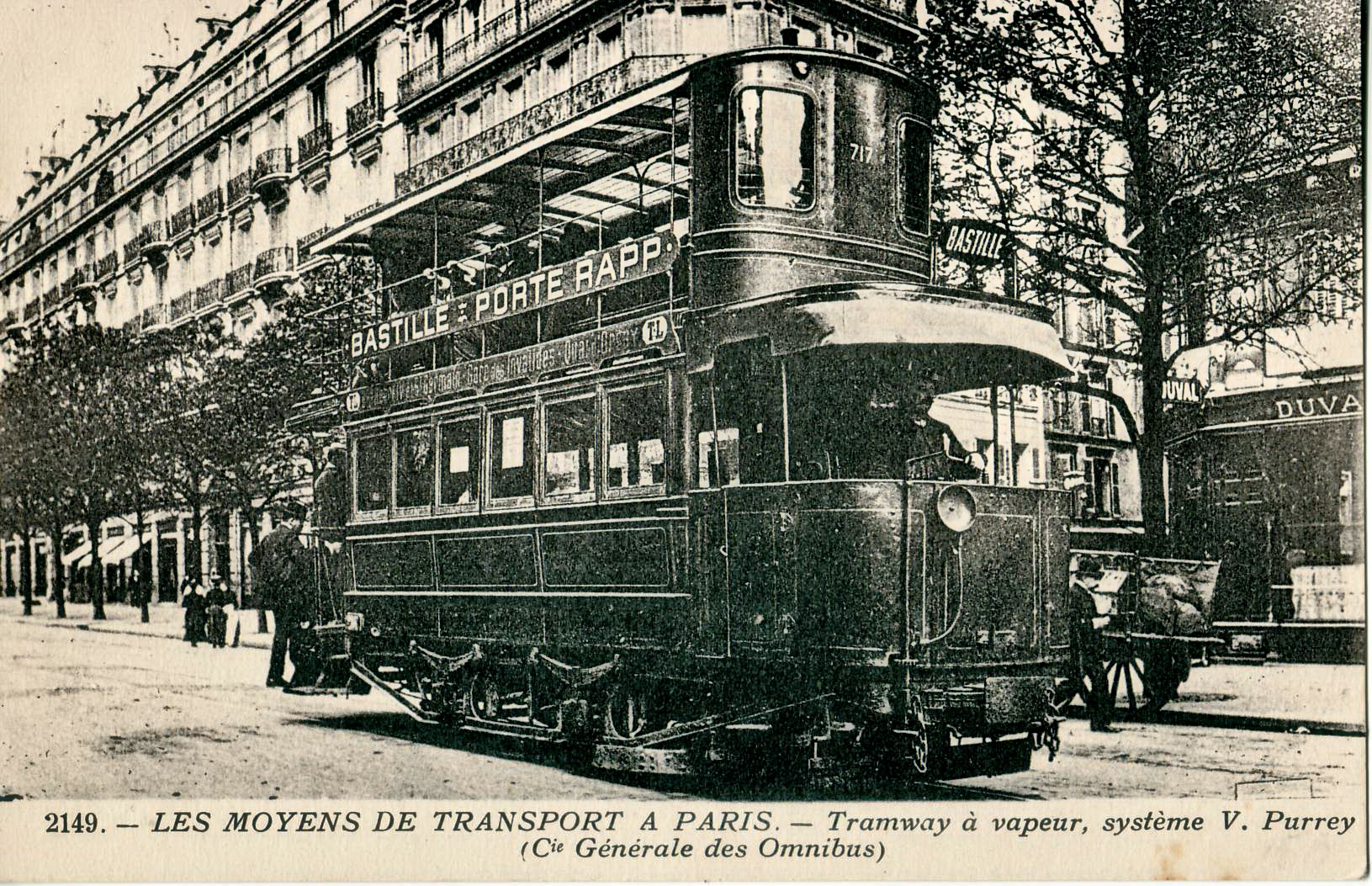 Carte postale ancienne éditée par ES, collection Les moyens de transport à Paris, N°2149Tramway à vapeur, système V. Purrey (Compagnie générale des omnibus)